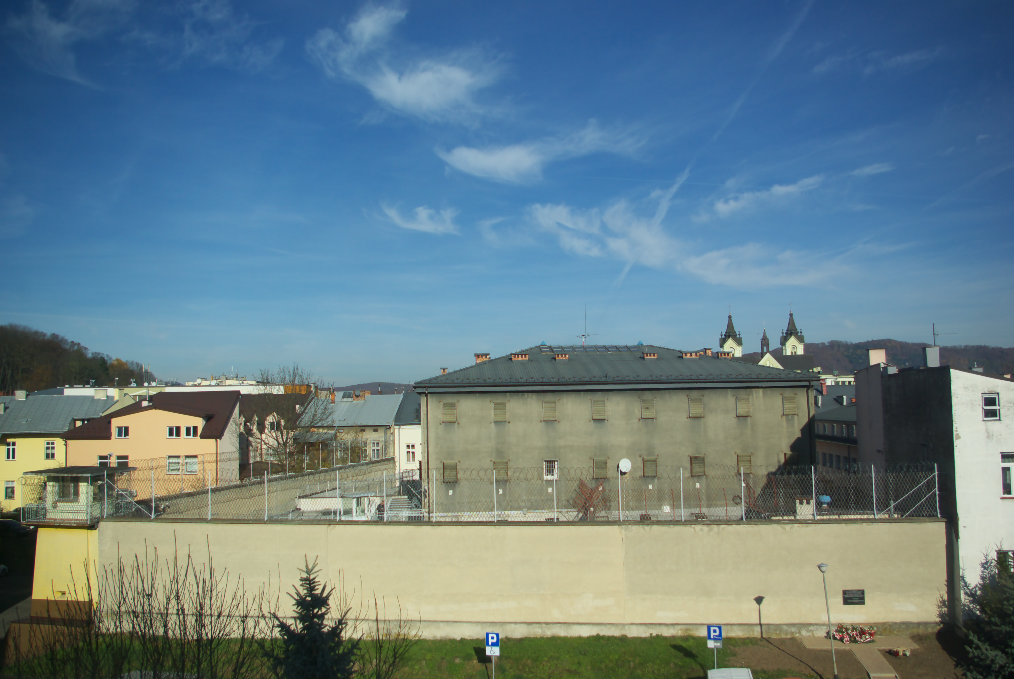 Areszt Śledczy w Sanoku